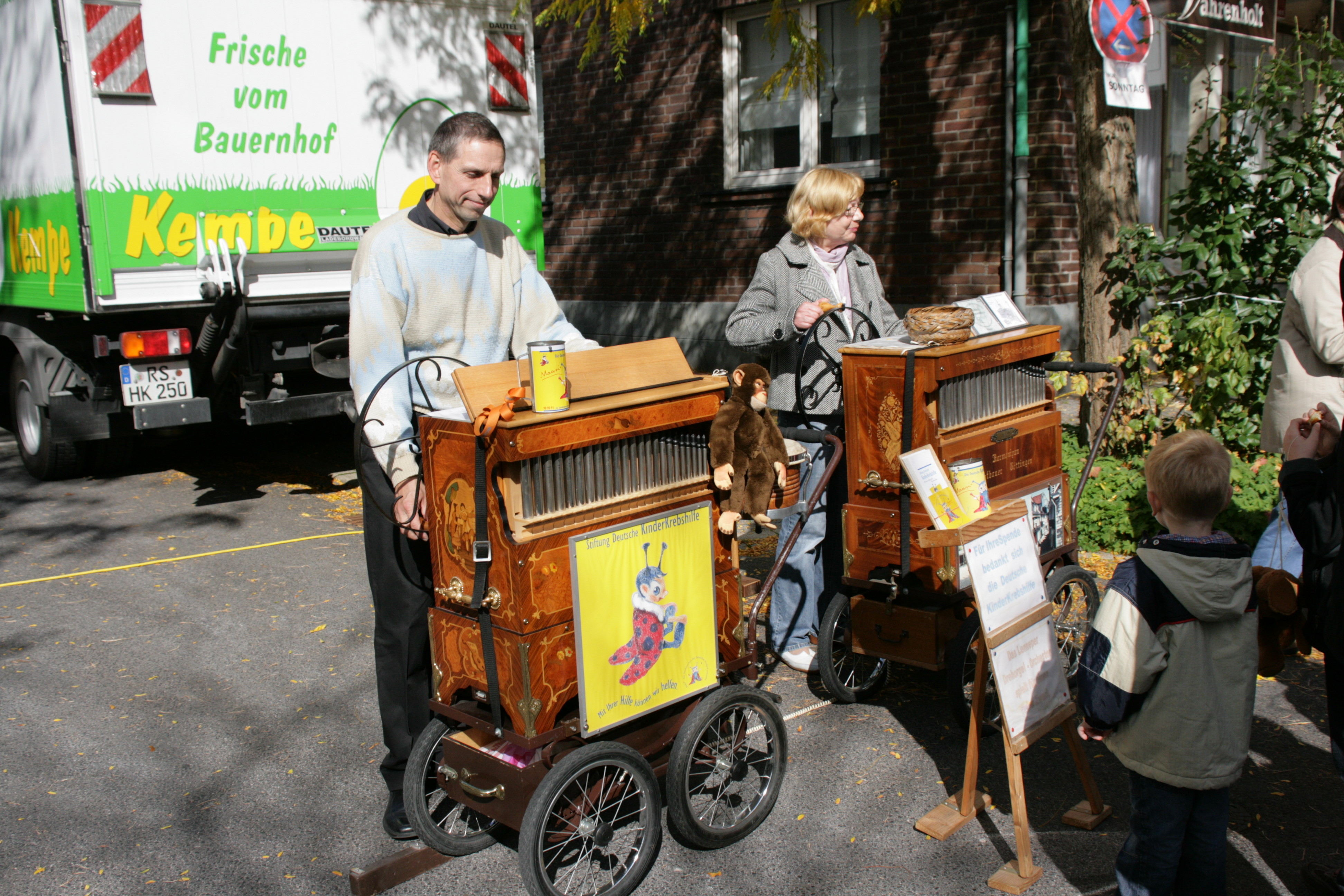 Bauernmarkt in Remscheid-Lüttringhausen